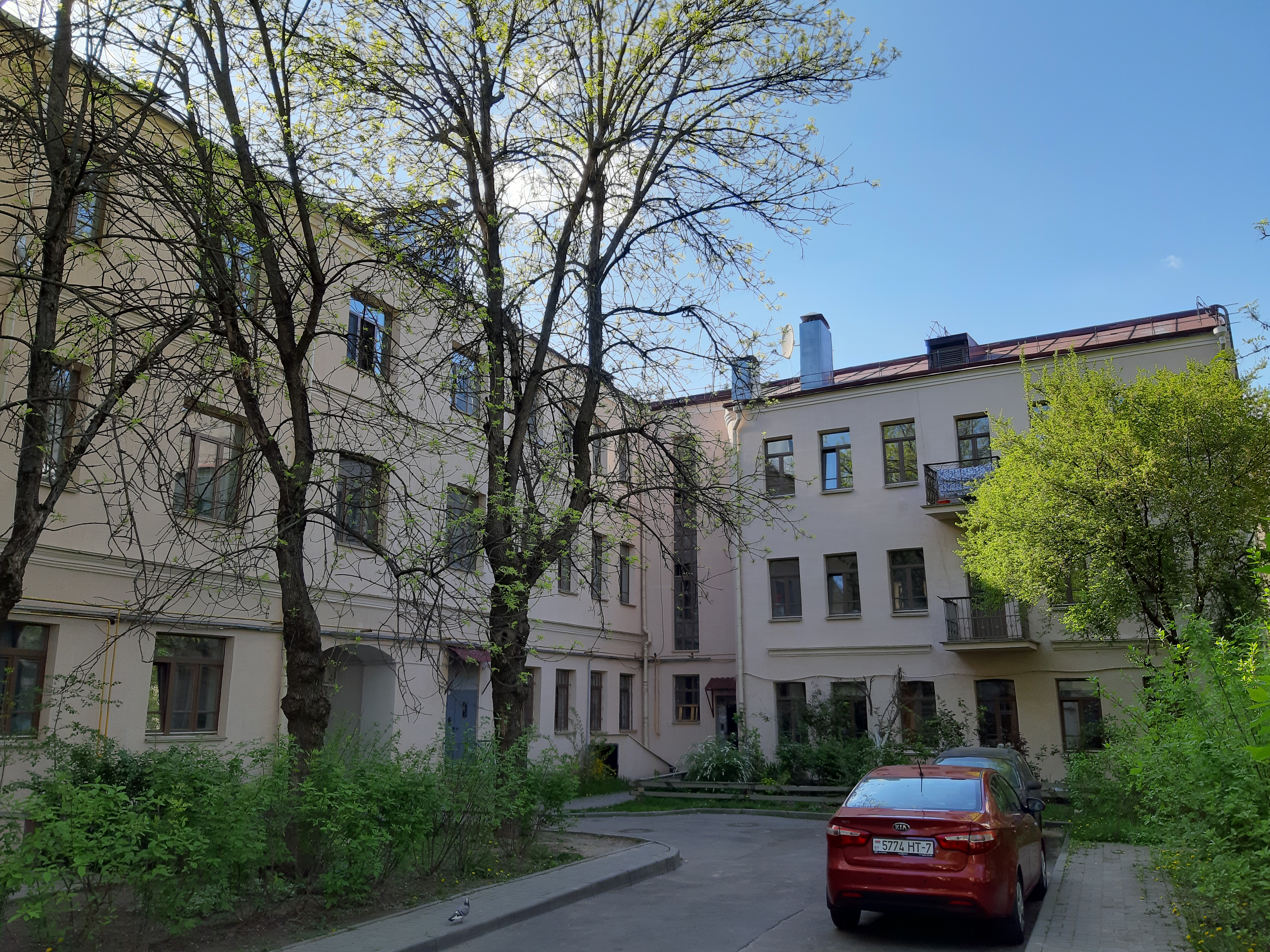 Мінск. Квартал між Гарадскім Валам і Валадарскага